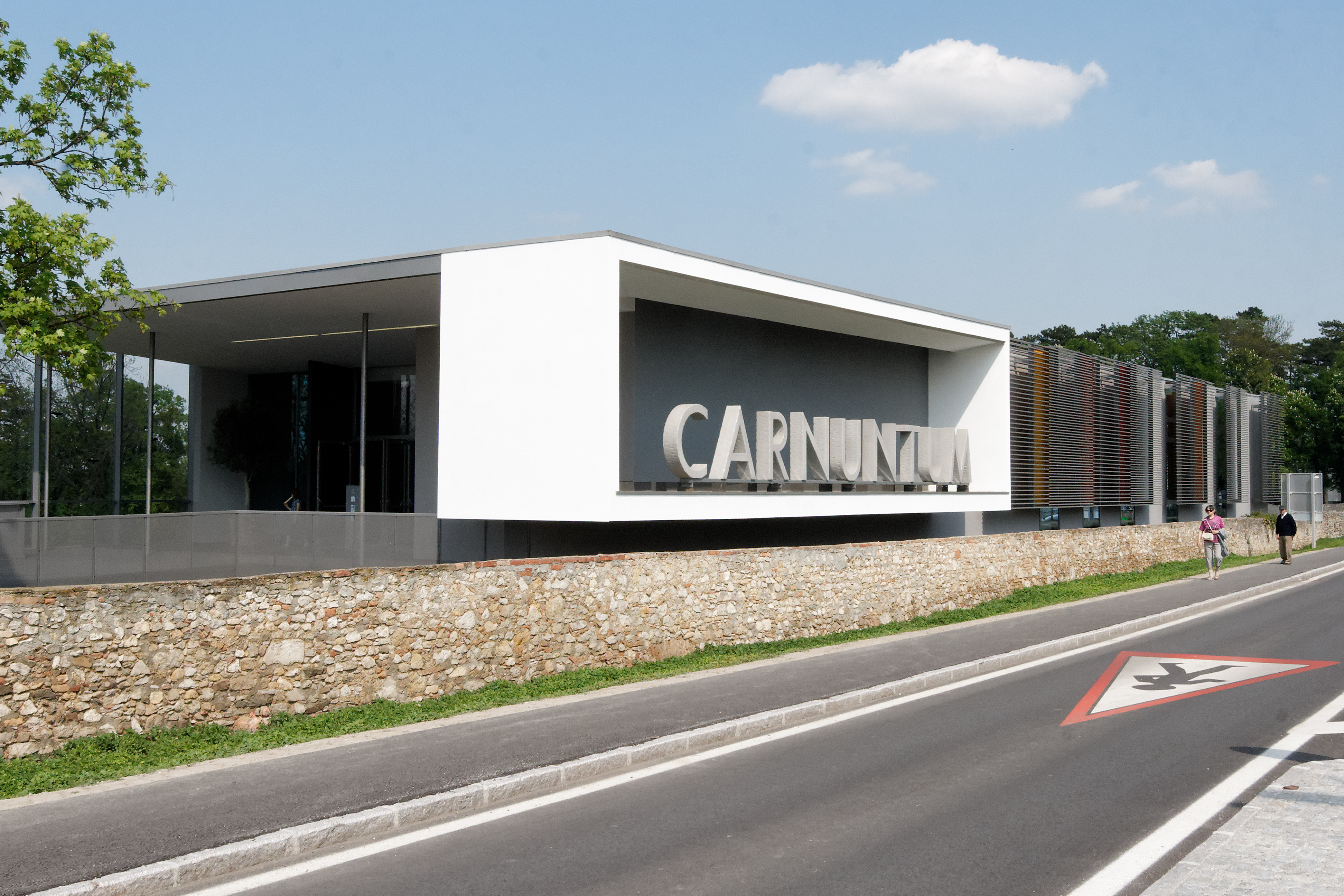 Empfangsgebäude des Freilichtmuseums Carnuntum in der Marktgemeinde Petronell-Carnuntum, Niederösterreich.